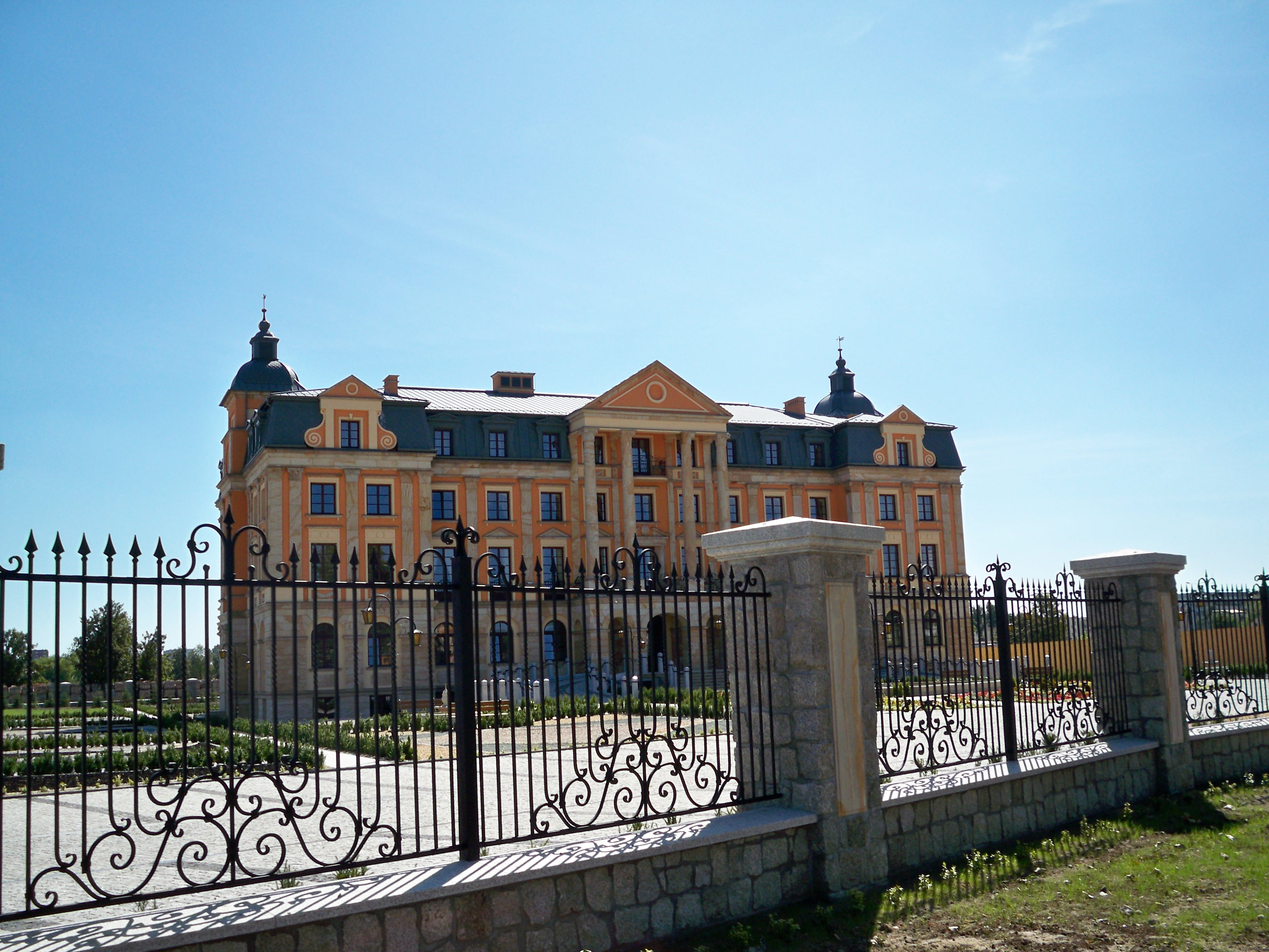 Pałac Bursztynowy (2009 r.)